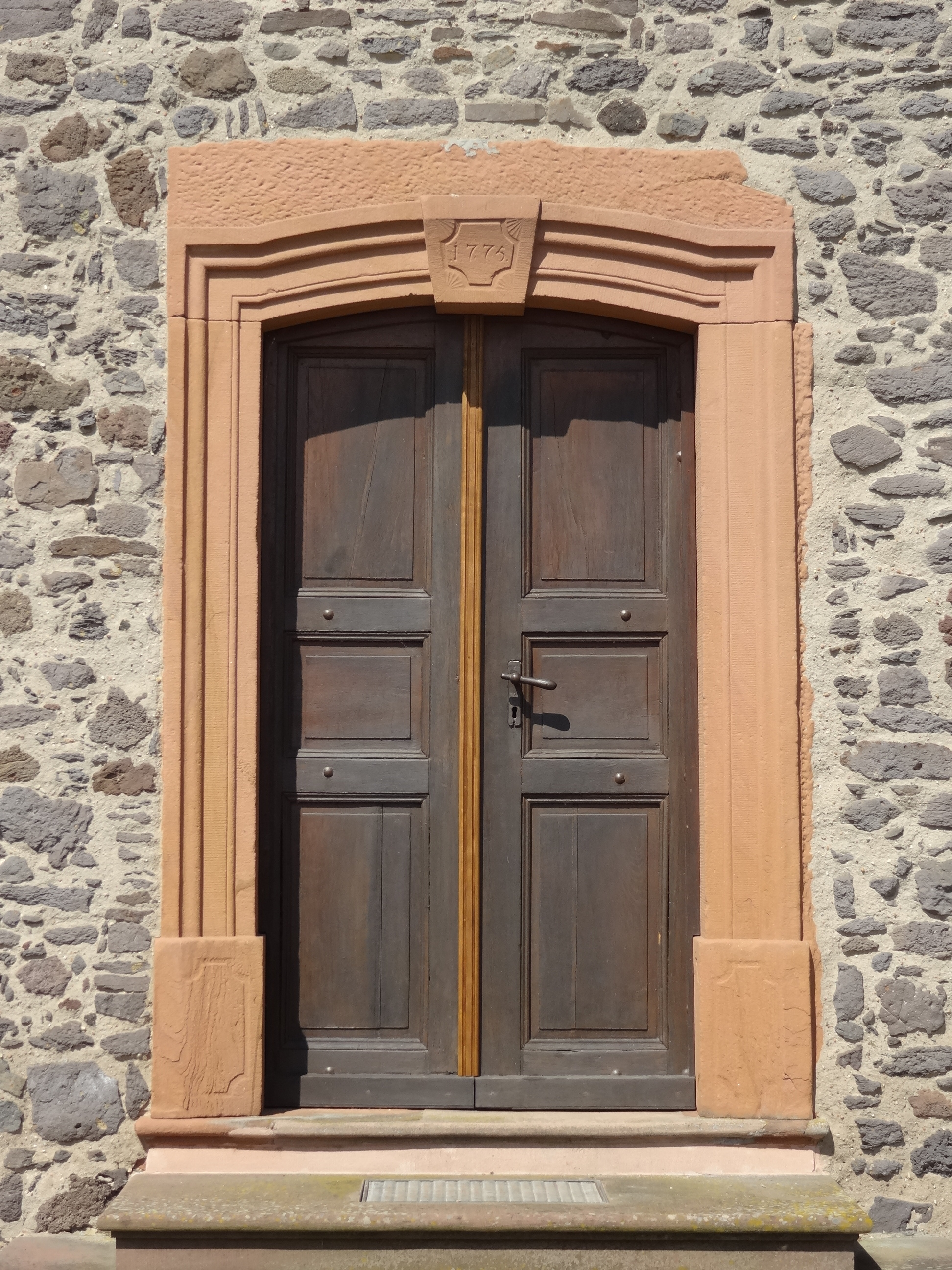 Evangelische Kirche Nonnenroth (Hungen)